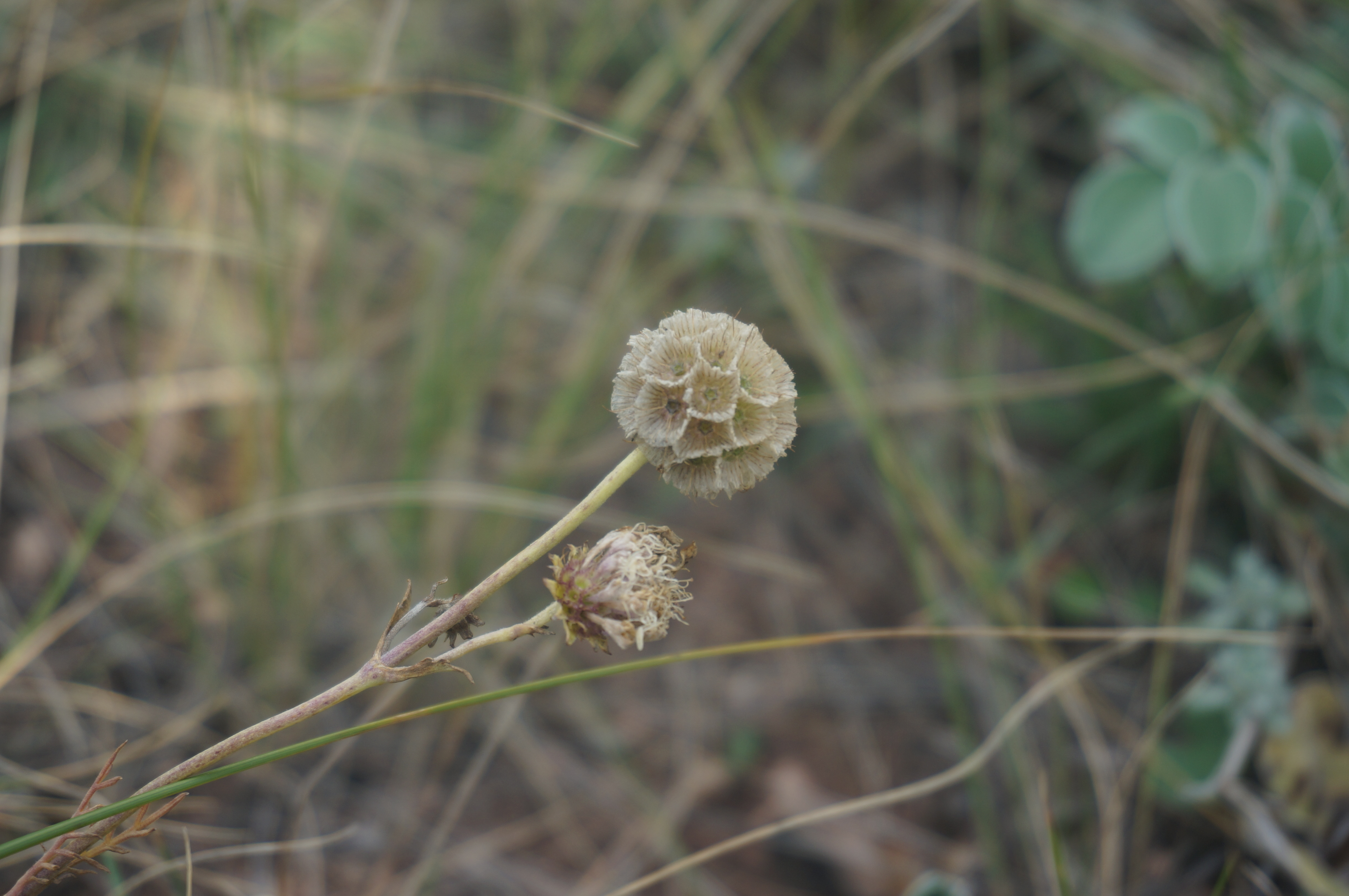 Скабиоза исетская в середине августа, Серноводный шихан, Самарская область, Россия.